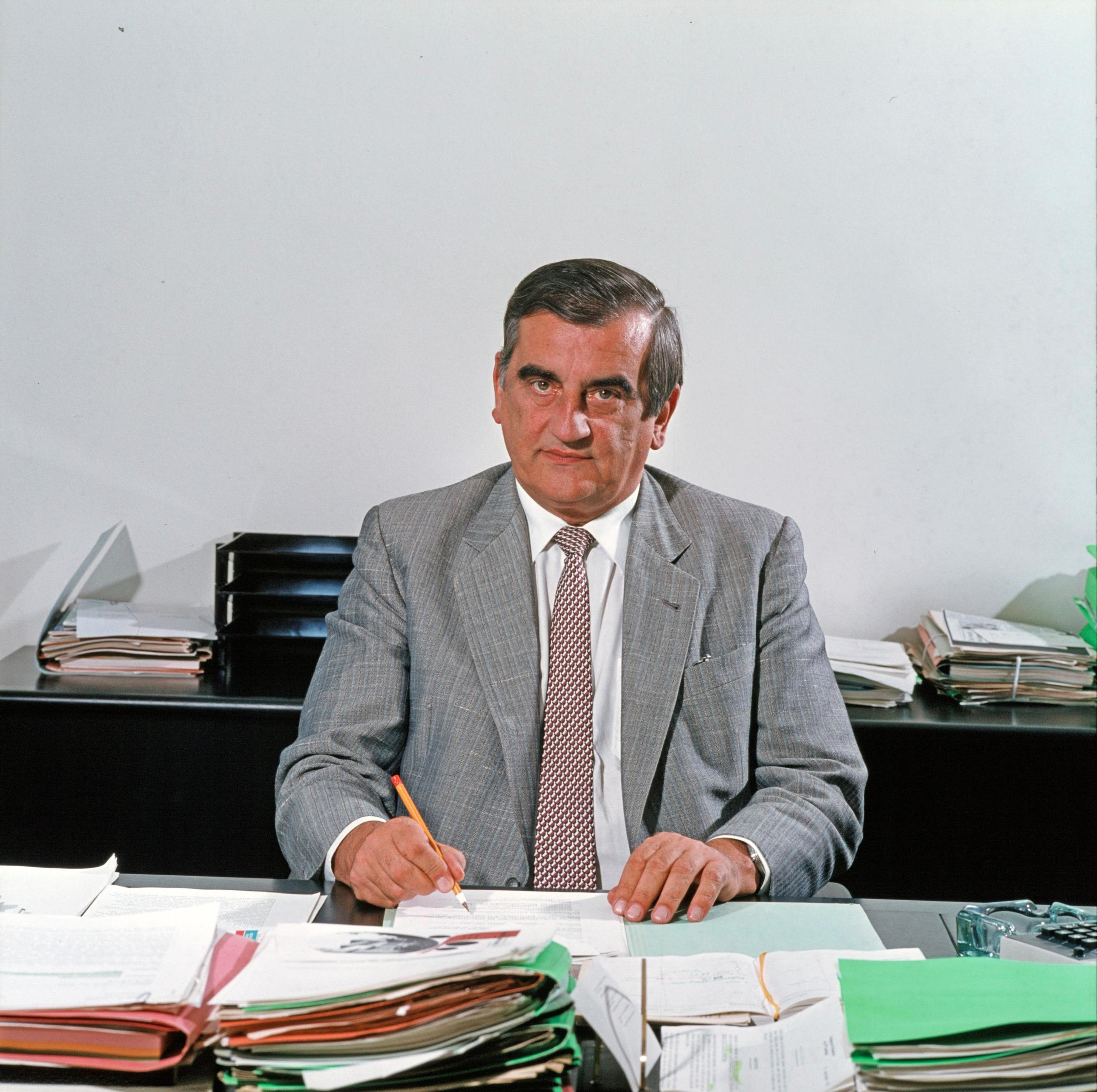 Rudolf Mandl war von 1969 bis 1984 Mitglied der Vorarlberger Landesregierung und in dieser Zeit von 1974 bis 1984 Landesstatthalter von Vorarlberg. Hier auf einer offiziellen Portraitaufnahme vom November 1981